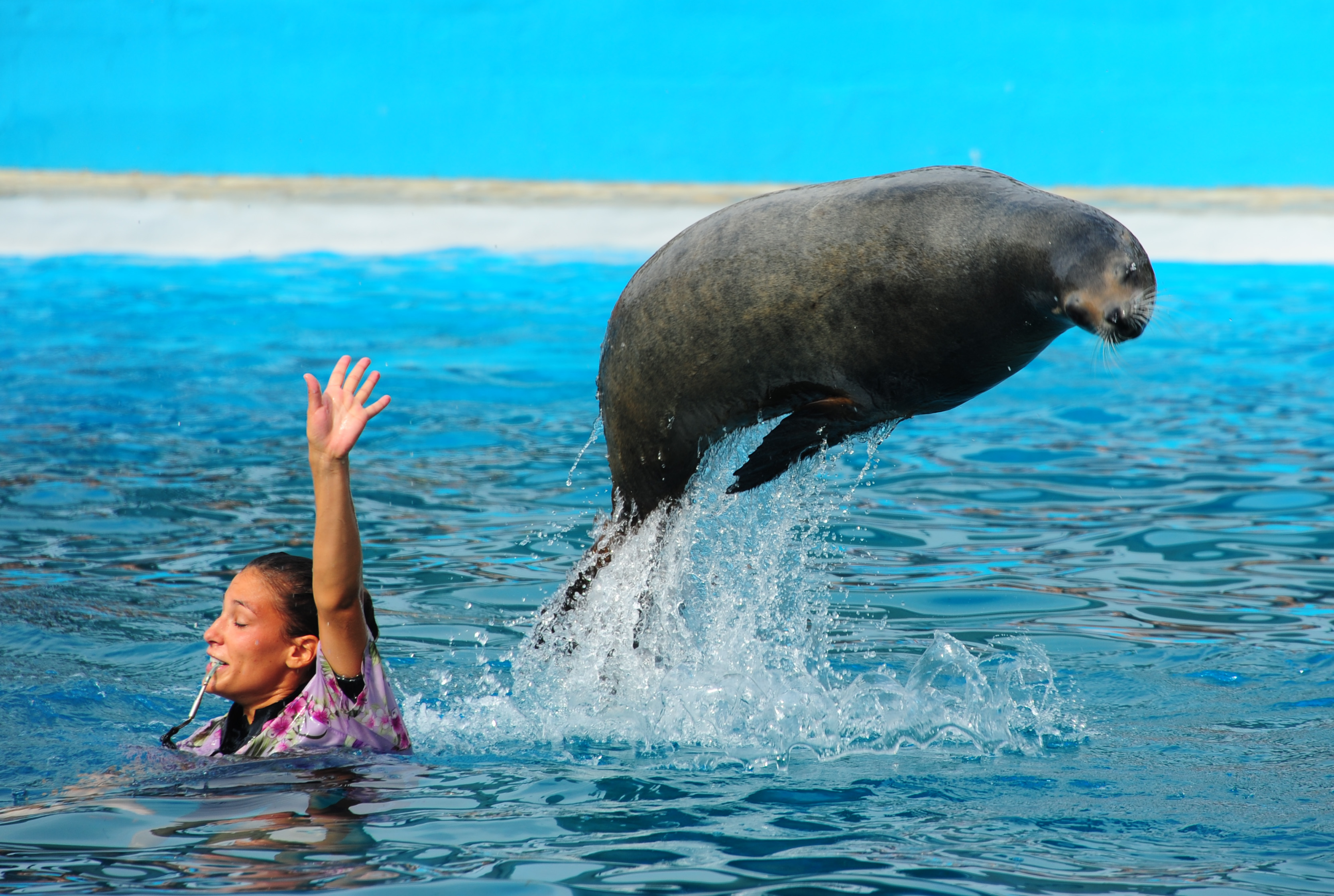 Otarie en représentation au Marineland d'Antibes